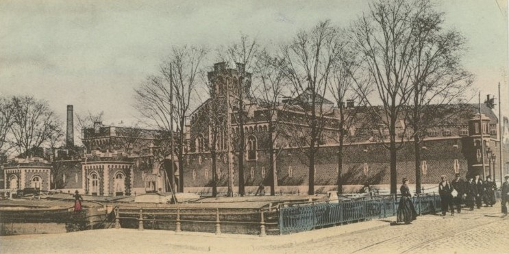 La prison de Charleroi vers 1909